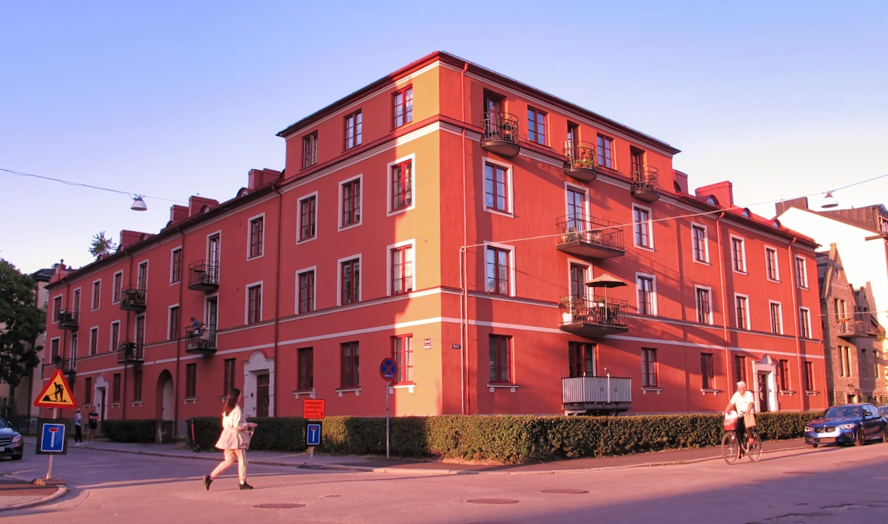 Nordöstra hörnet av korsningen Manillagatan - Nygatan i Örebro, Fritz Bengtson arkitekt, huset byggt 1930